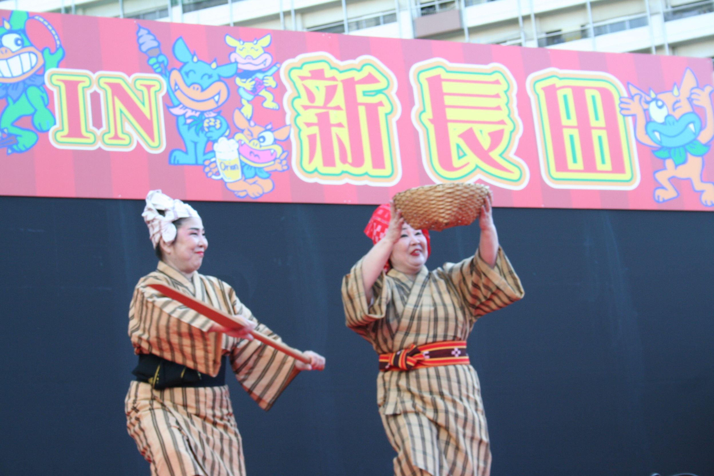 2009年10月4日、兵庫県神戸市長田区で開催された琉球祭の様子。